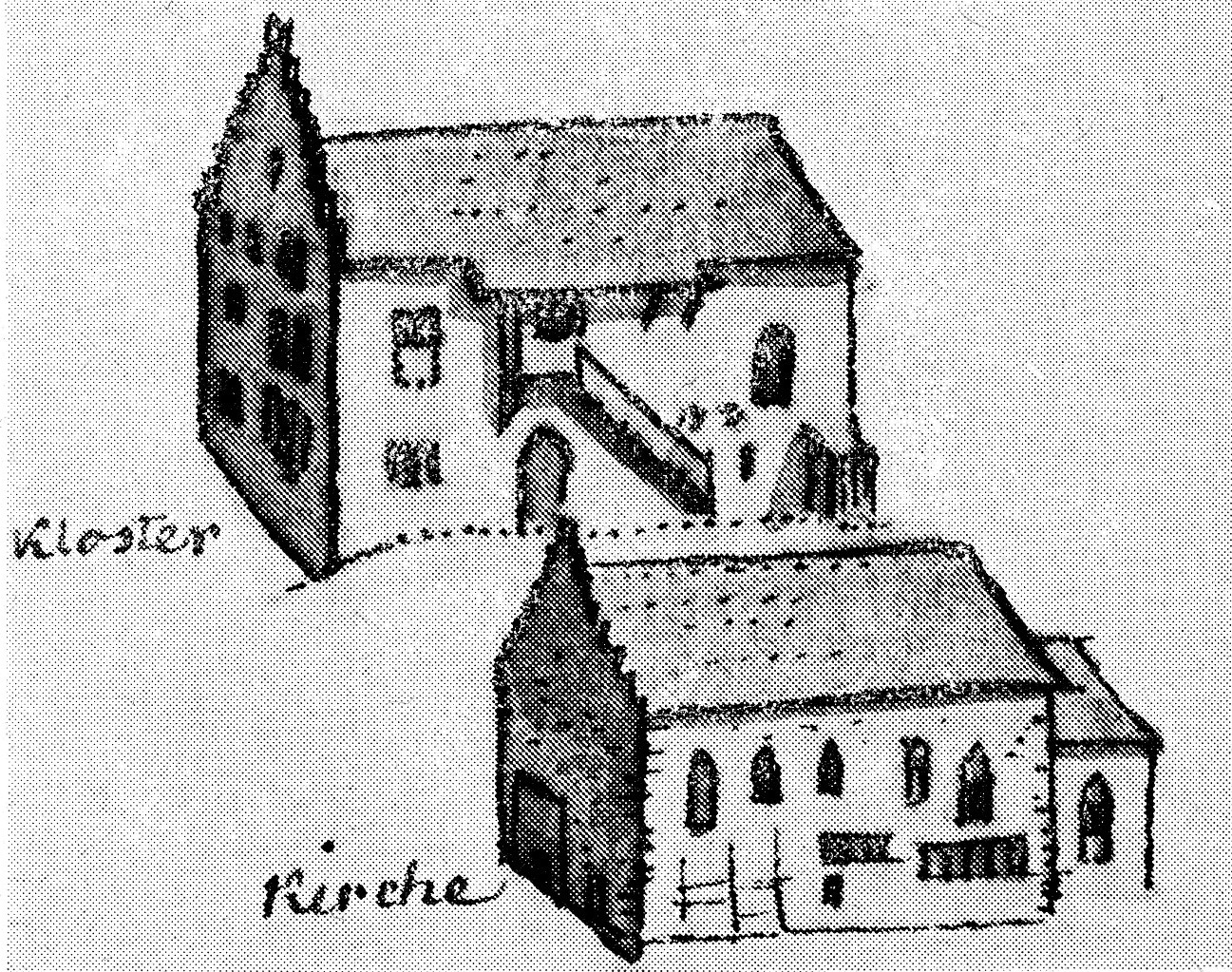 Ansicht des Klosters und der Kirche im Gfenn bei Dübendorf.